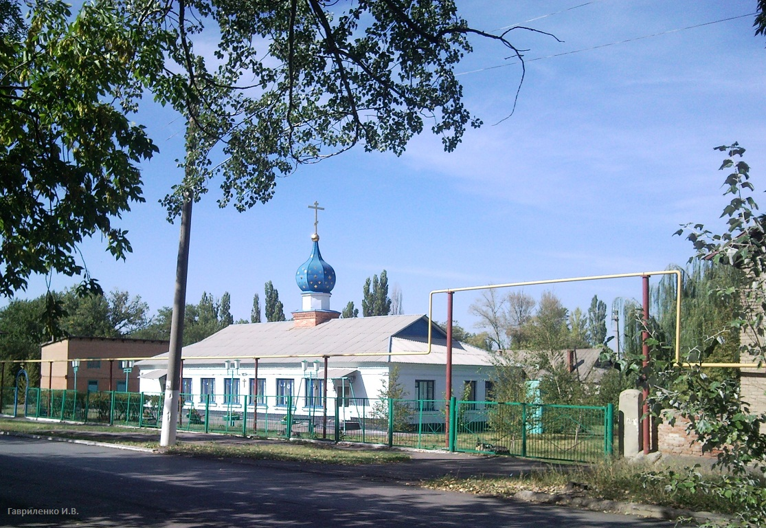 Иверский Храм. Адрес: 347022, Ростовская область, Белокалитвенский район, пос.Шолоховский, ул. 40 лет Октября, 7. Свято-Иверский приход основан в сентябре 1998 года. Приходу было выделено здание бывшего детского сада, в котором усилиями прихожан оборудован молитвенный дом. 7 января 1999 года в Свято-Иверской церкви была совершена первая Божественная литургия. В 2003 году к 50-летию поселка на молитвенный дом был установлен купол с крестом.